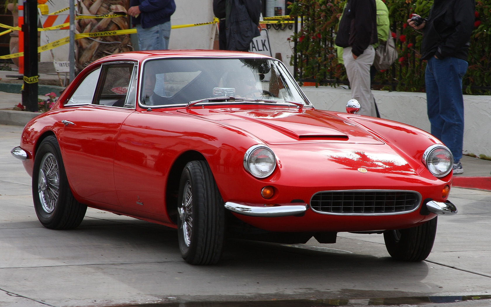 2011 Desert Classic, La Quinta, CA